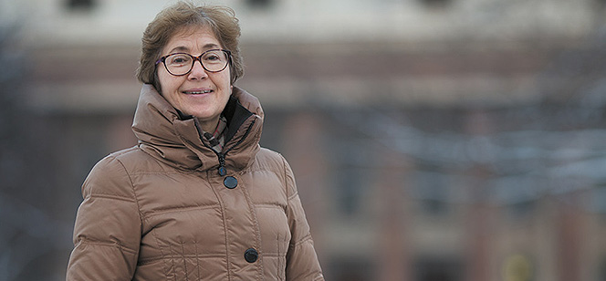 Наталья Васильевна Зубаревич, профессор кафедры экономической и социальной географии России географического факультета Московского государственного университета, директор региональной программы Независимого института социальной политики (Москва)